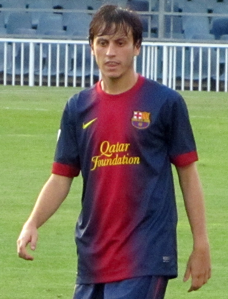 Javier Espinosa in a 2012-13 FC Barcelona home kit. Foto realizada por Javier Segura (@castroquini)